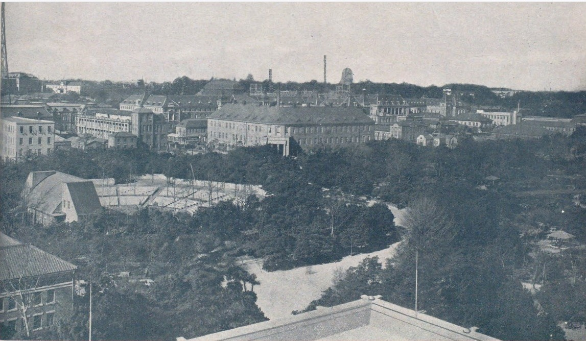 昭和初期の日比谷野外音楽堂。後方に霞が関官庁街